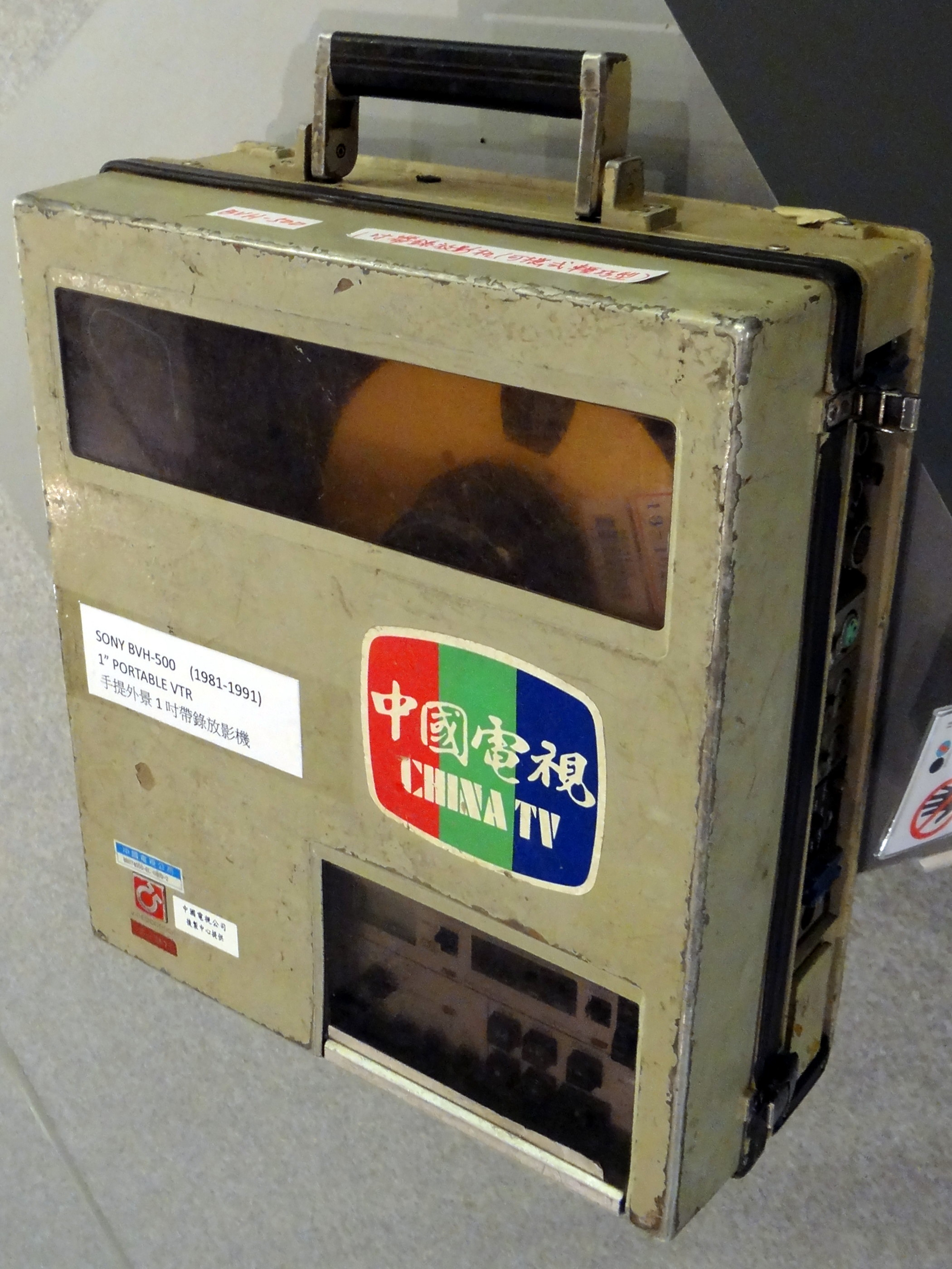 松山文化創意園區「金鐘五十．響」特別展展示品：1981年至1991年，中國電視公司使用的Sony手提外景1吋帶錄放影機BVH-500。